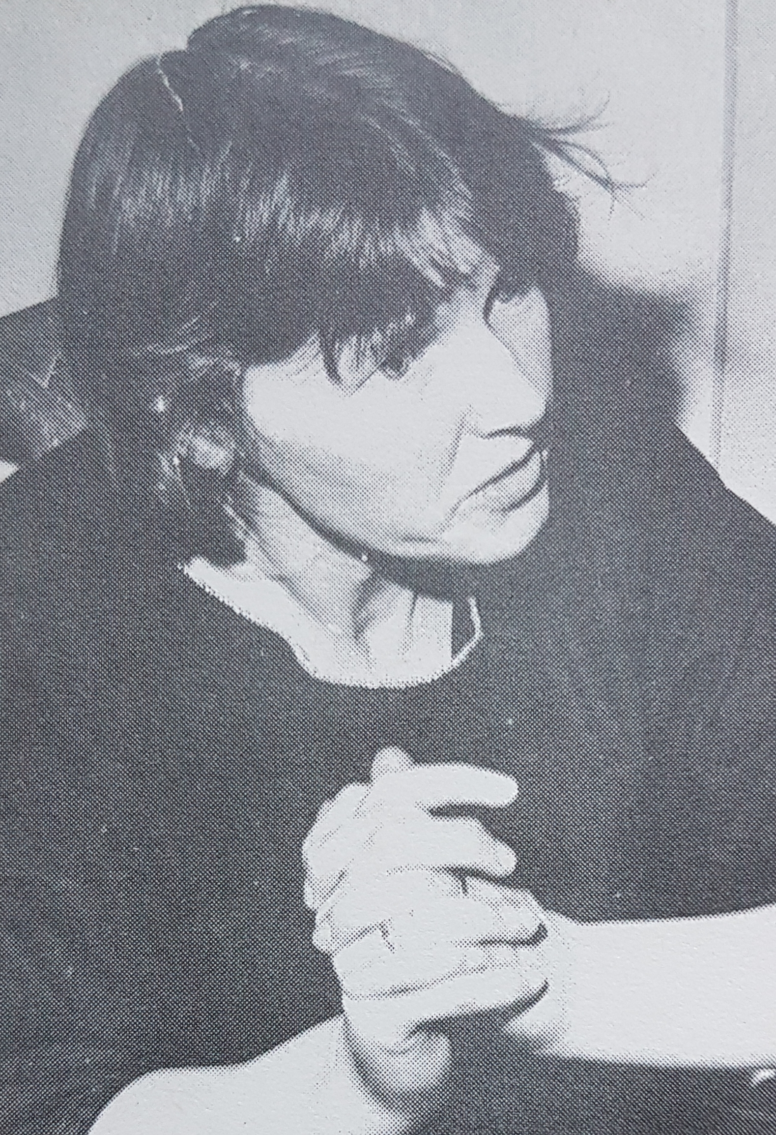 Gerd Göran Artist from Sweden